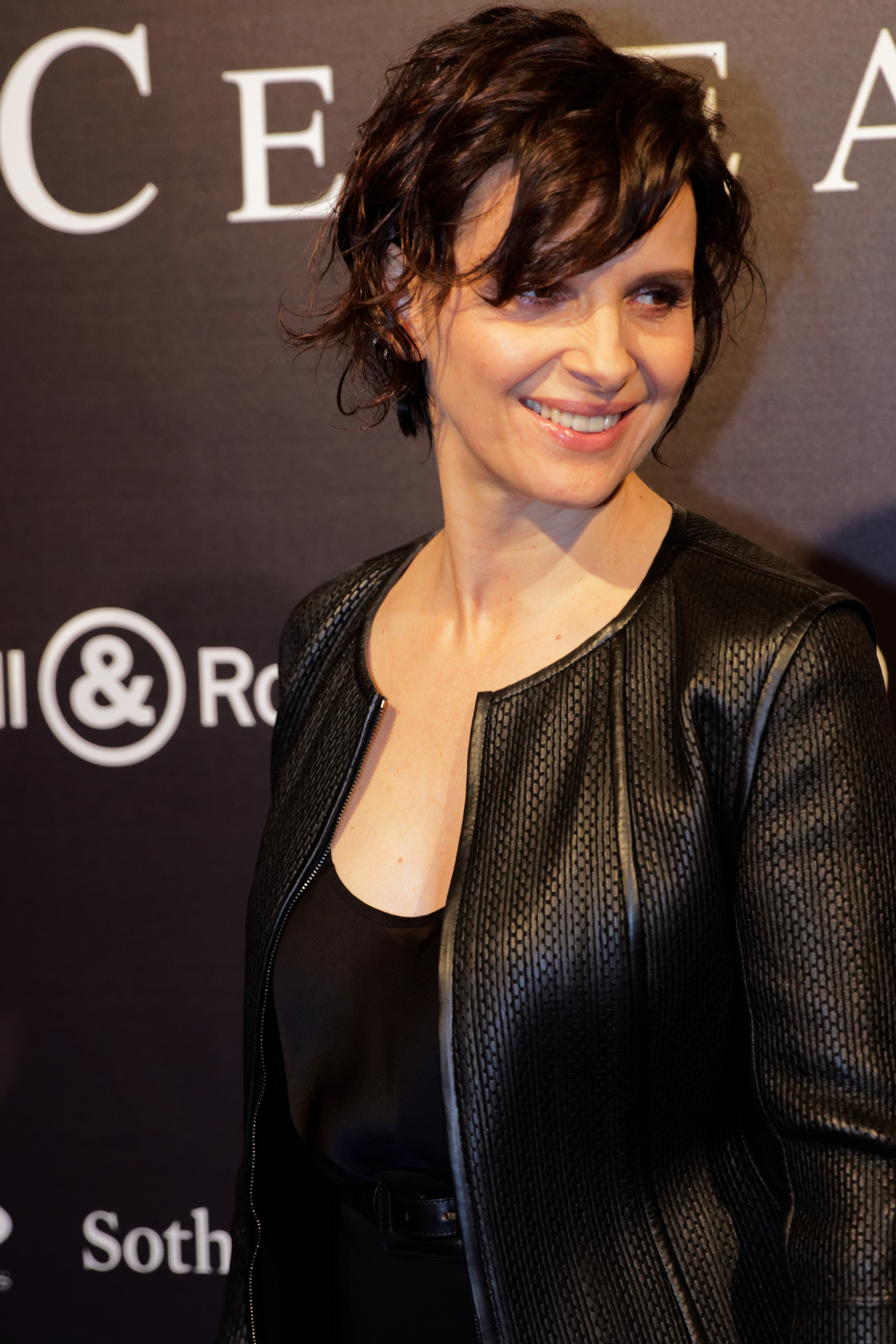 Photocall du festival automobile international 2016.